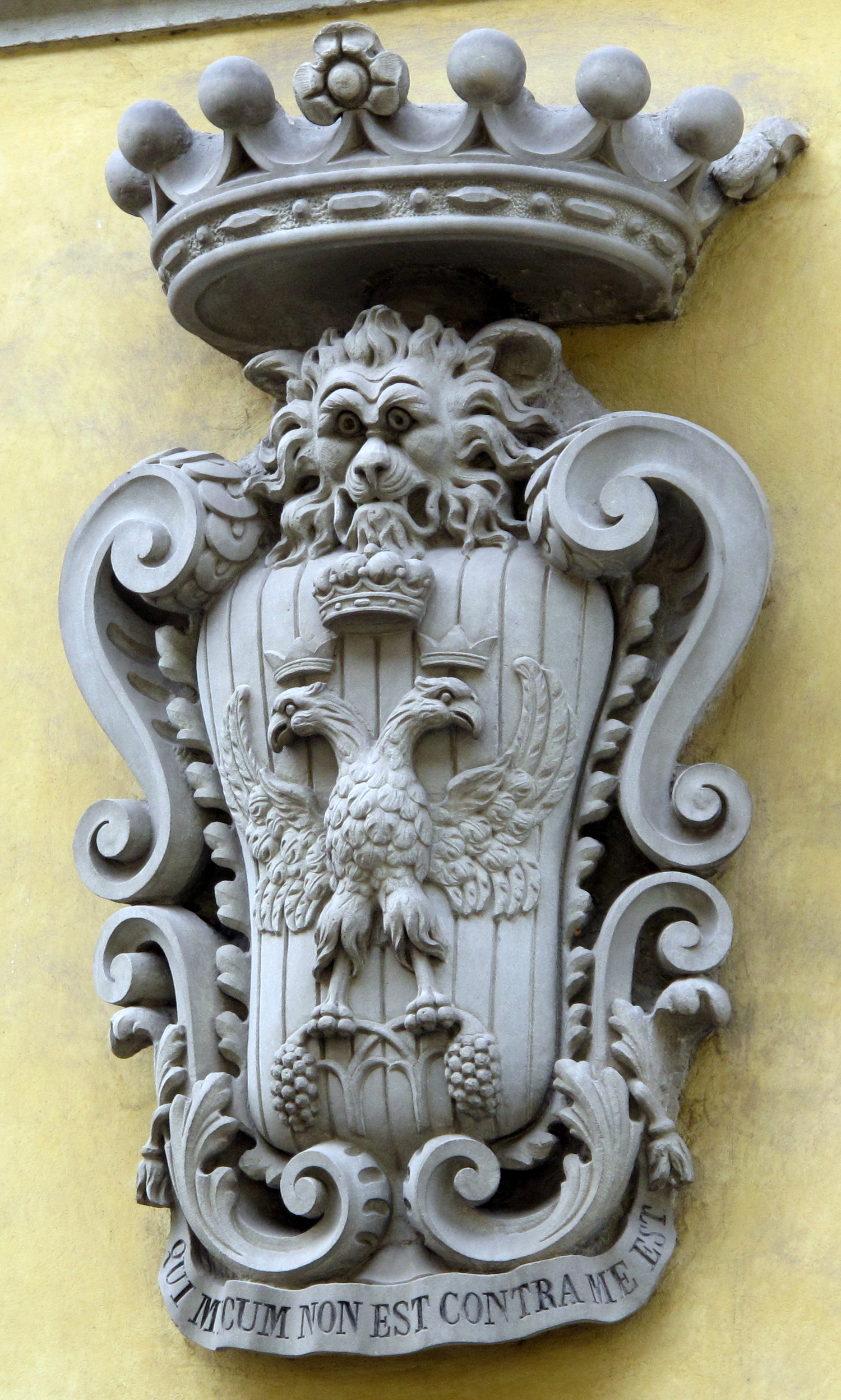 Palazzo Pannocchieschi, stemma